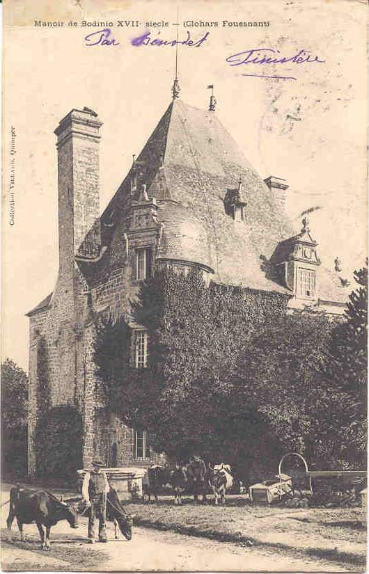 Château de Bodinio (carte postale ancienne) en Clohars-Fouesnant